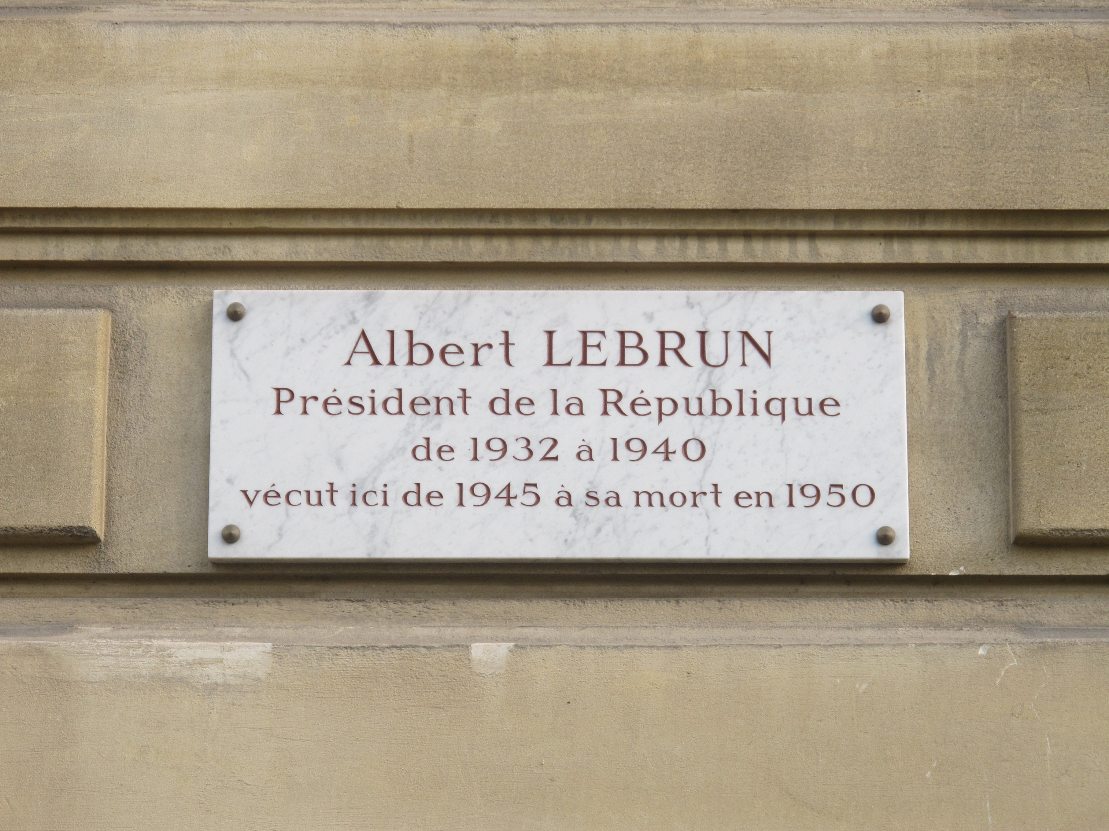 Plaque en hommage à Albert Lebrun, n°19 boulevard de Beauséjour (Paris, 16e).